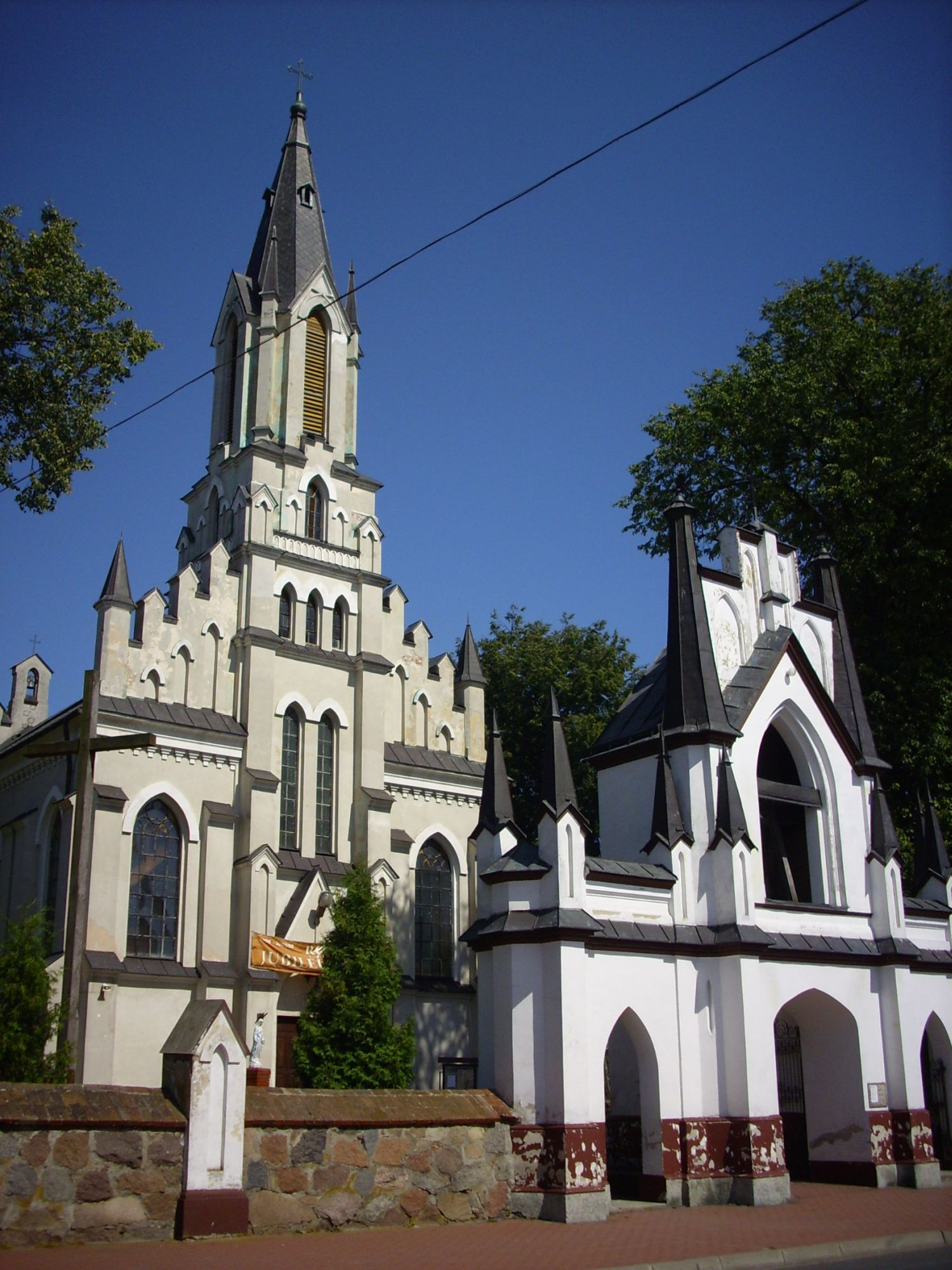 Stara Kornica (pow. łosicki, woj. mazowieckie, Polska). Zespół kościoła parafialnego pw. Niepokalanego Poczęcia NMP z roku 1905 (zabytek nr rejestr. A-272).